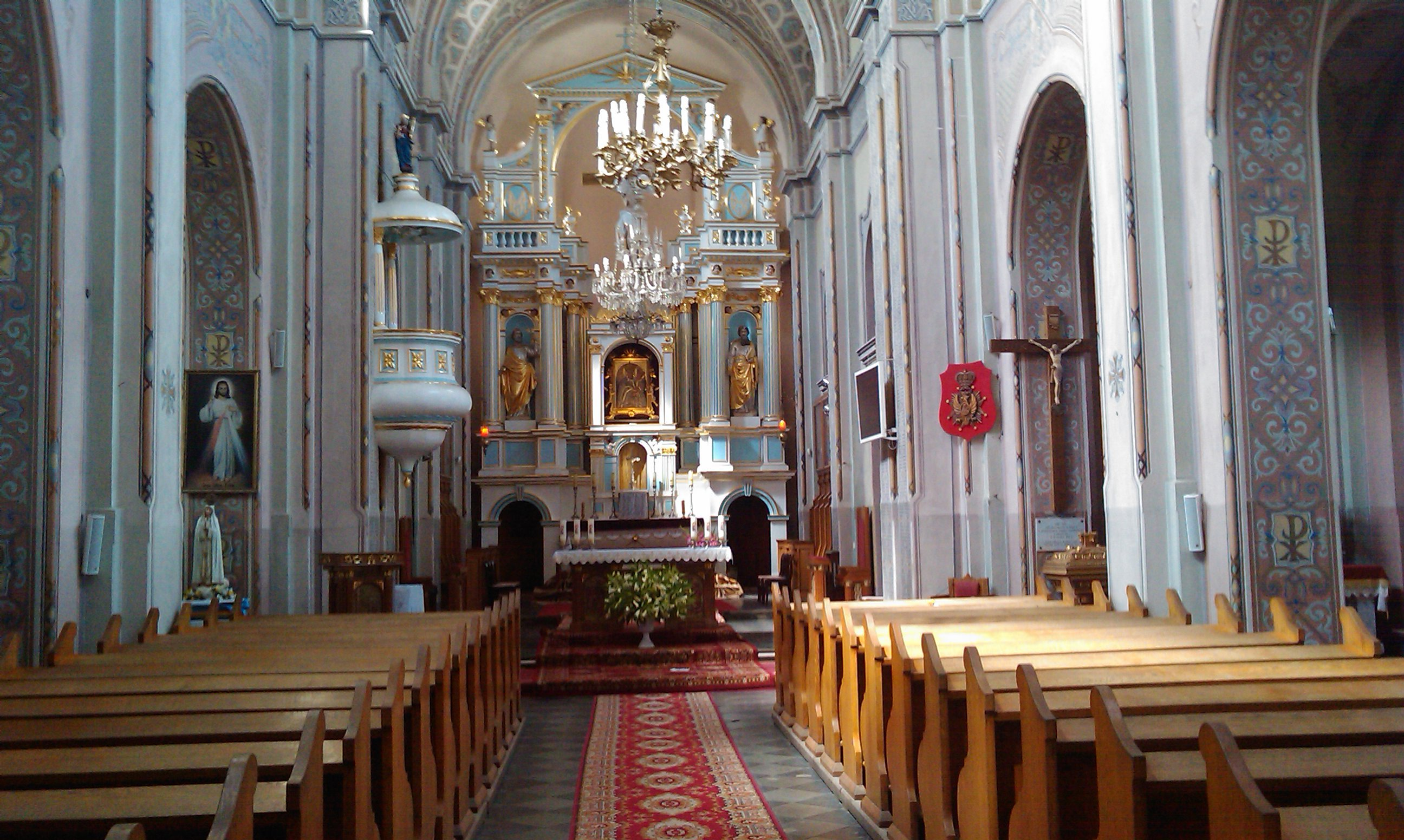 Kolegiata